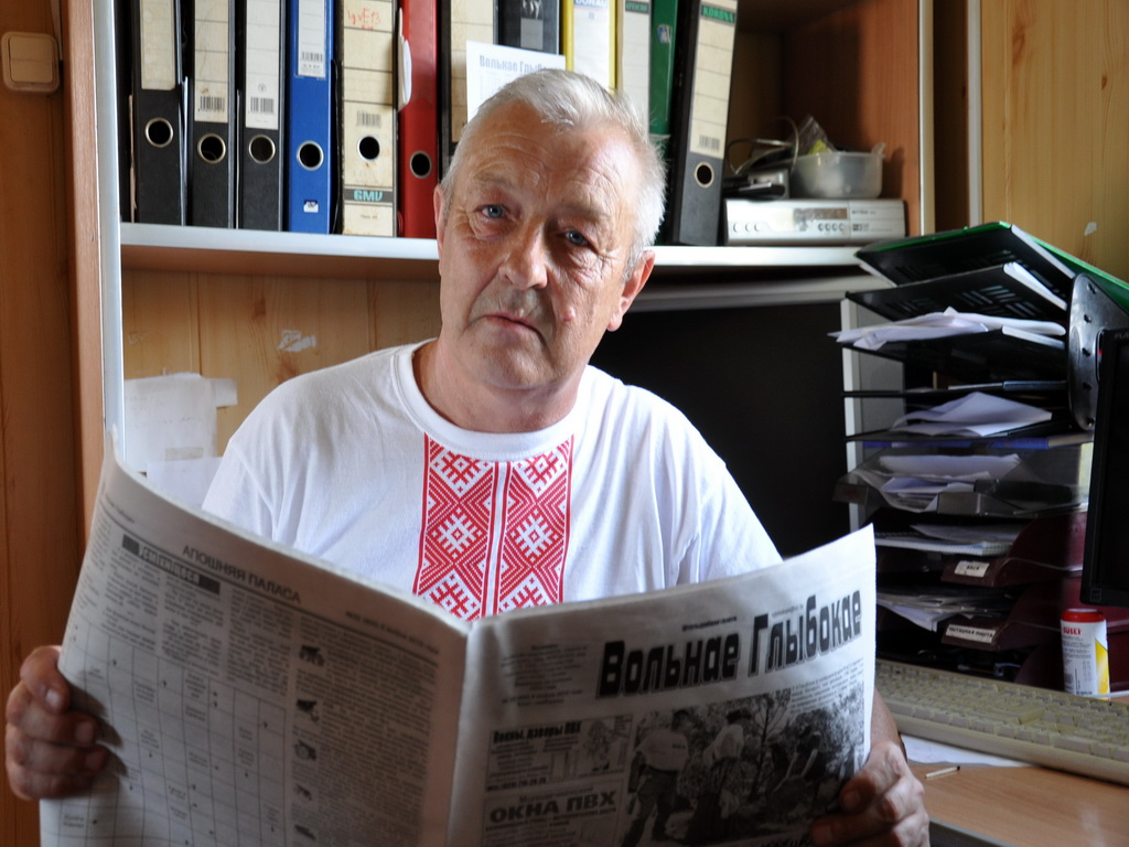 Беларуская (тарашкевіца): Рэдактар газэты Ўладзімер Скрабатун